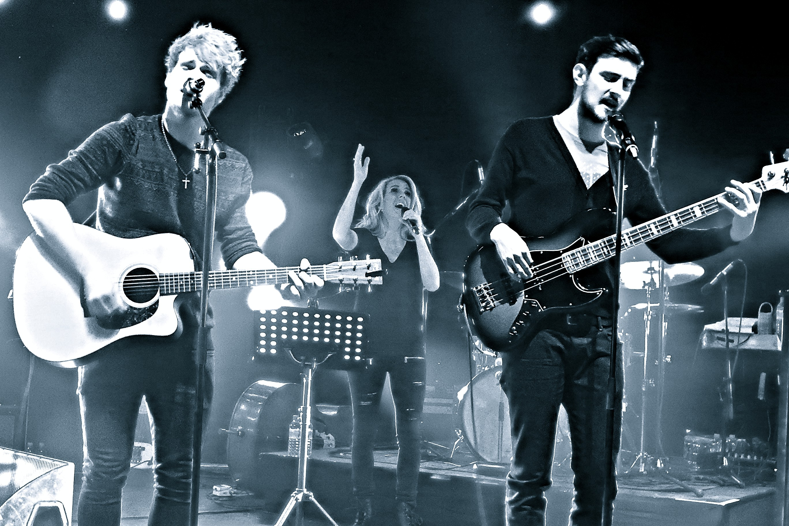 Kodaline (Ellie Goulding & Friends), O2 Shepherds Bush Empire